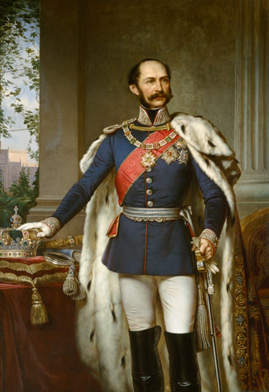 Король Максимилиан II Maximilian II. Joseph (Bayern)